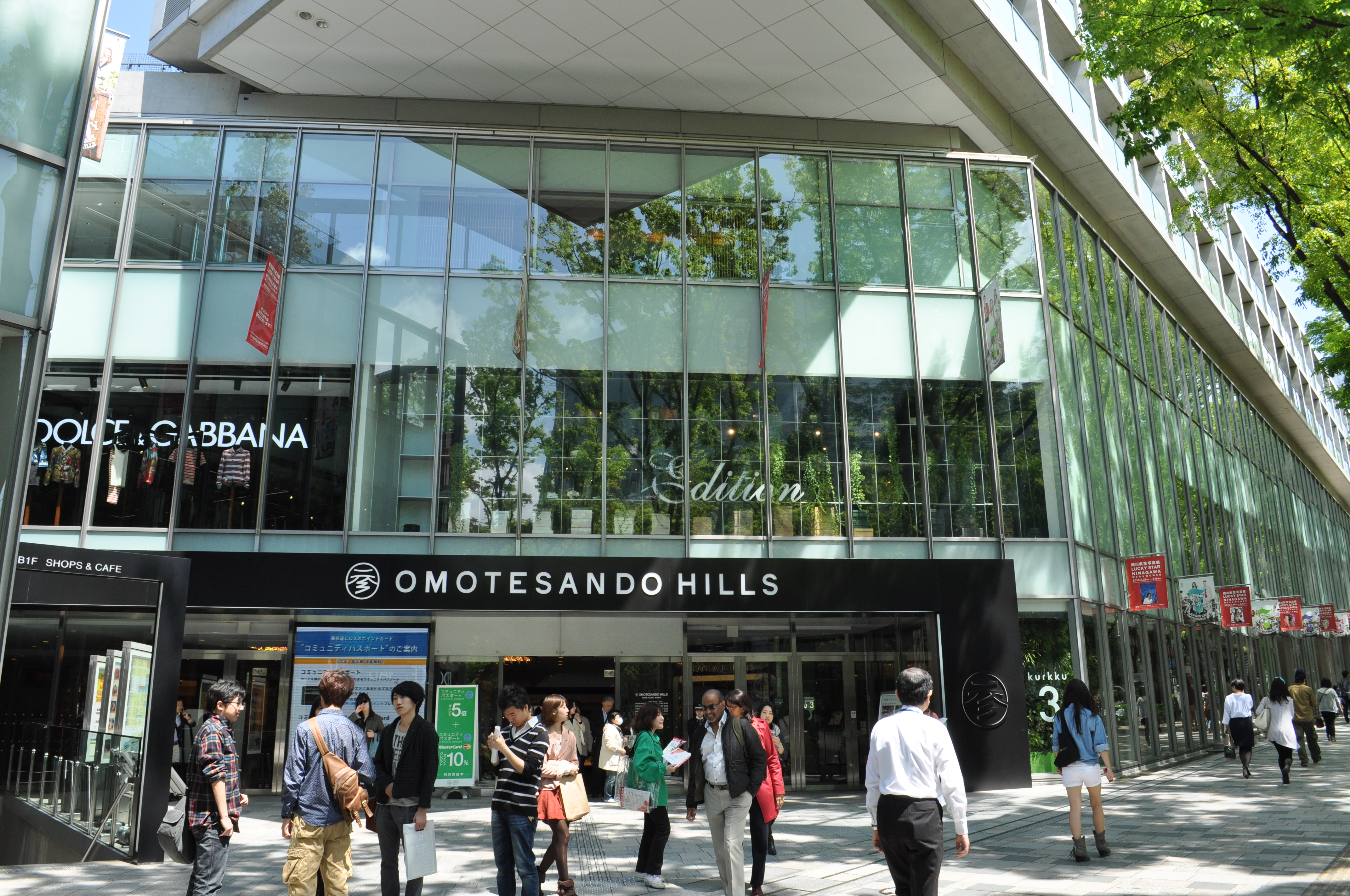 表参道ヒルズ